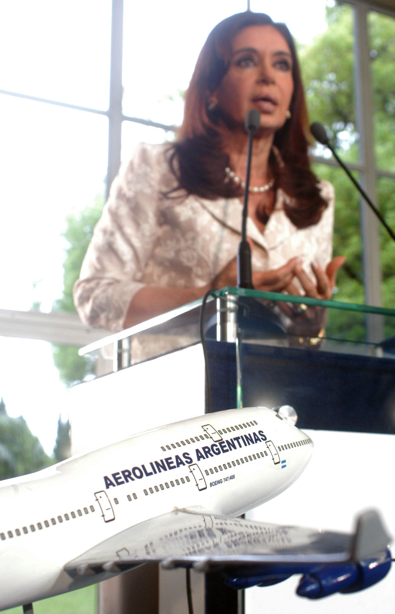 La presidenta Cristina Fernández anuncia el acuerdo suscripto para la recuperación de la línea aérea de bandera.